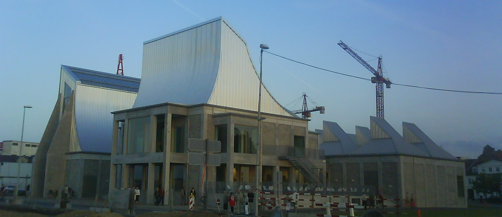 Utzon Center Ålborg. Photo taken by MRJ. Please acknowledge photographer.